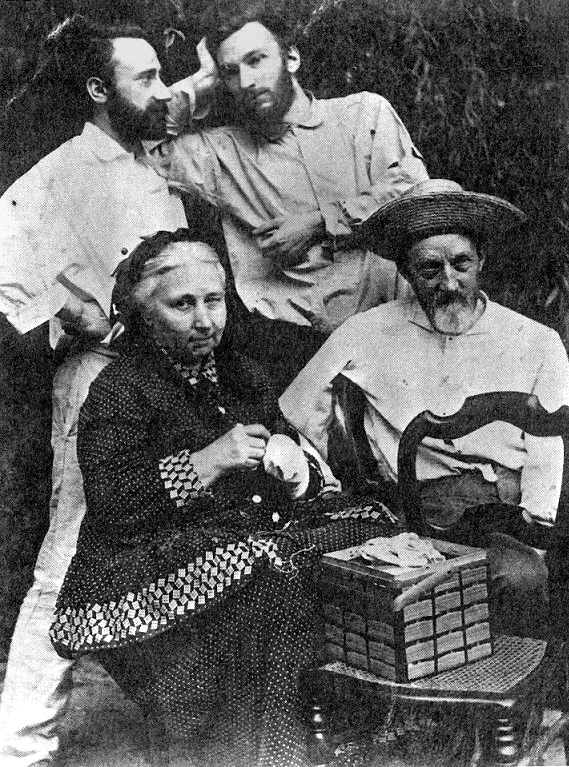 Jacques Curie (1856-1941, links) mit seinem Bruder Pierre Curie (1859-1906) und seinen Eltern Eugène Curie (1827-1910) und Sophie-Claire Depouilly (1832-1897)